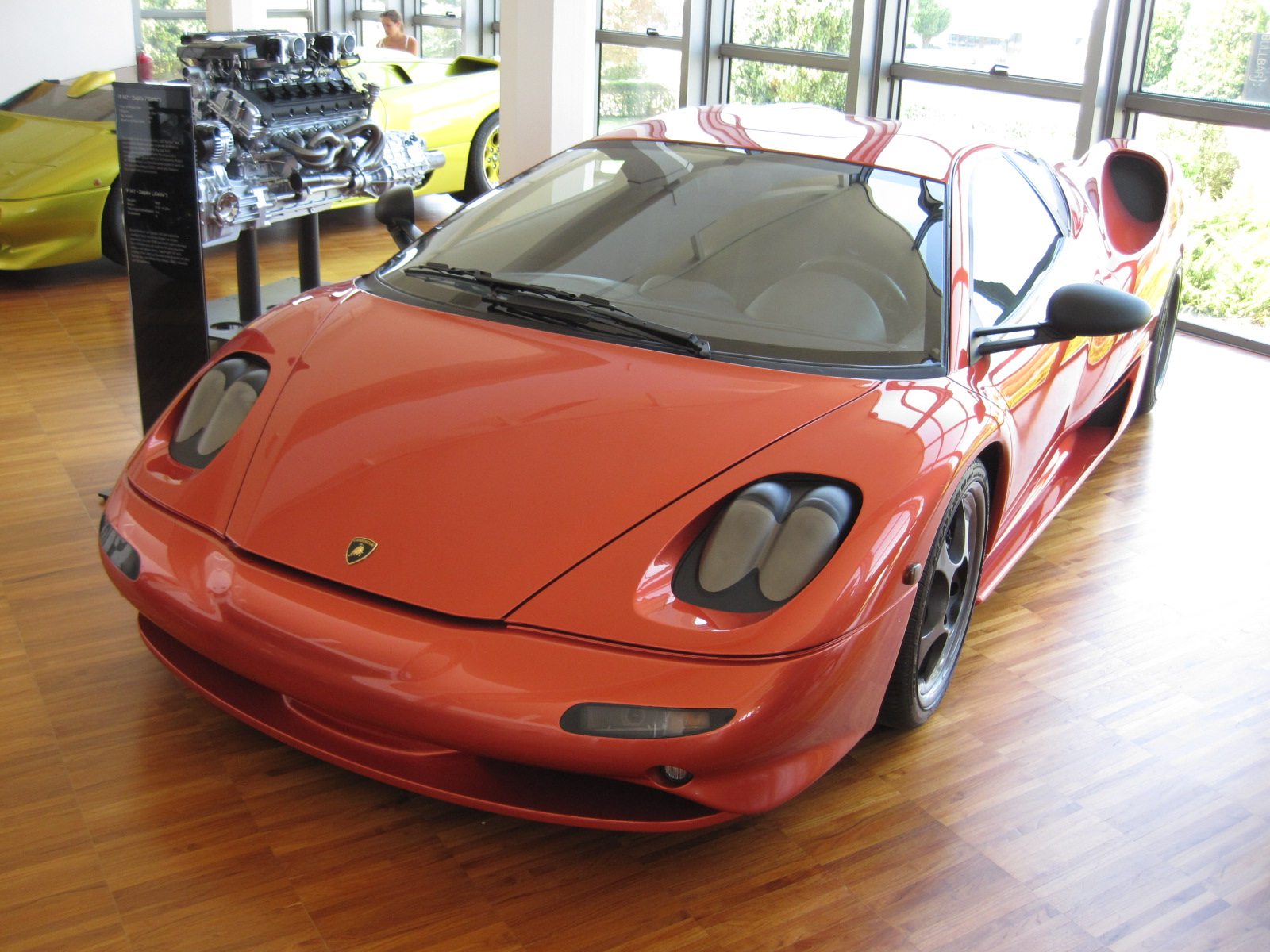 Musée Lamborghini - P147 Zagato / Canto - V12 / 6 litres - 1997